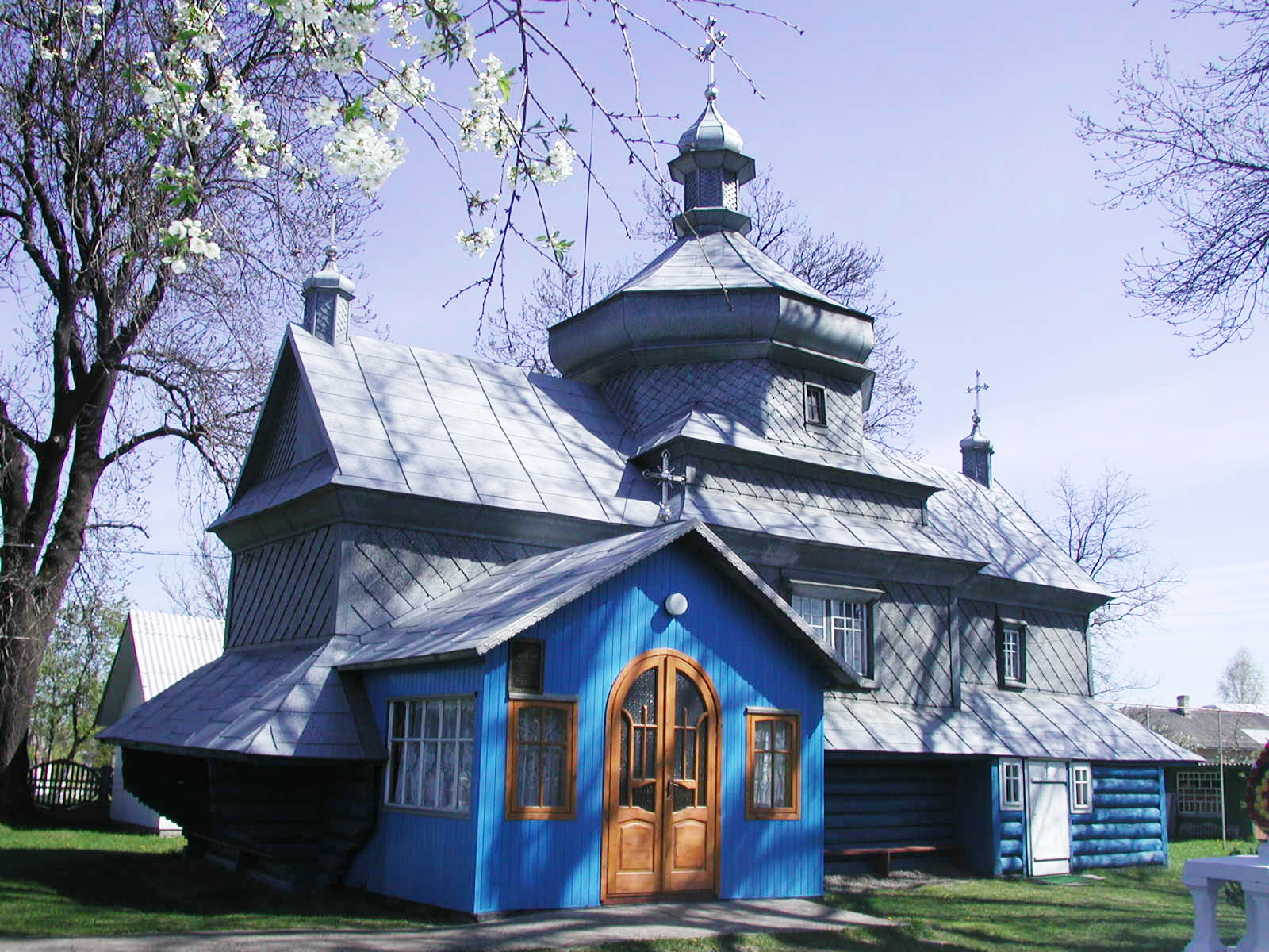 Успенська церква, Дубівці, Кіцманський район